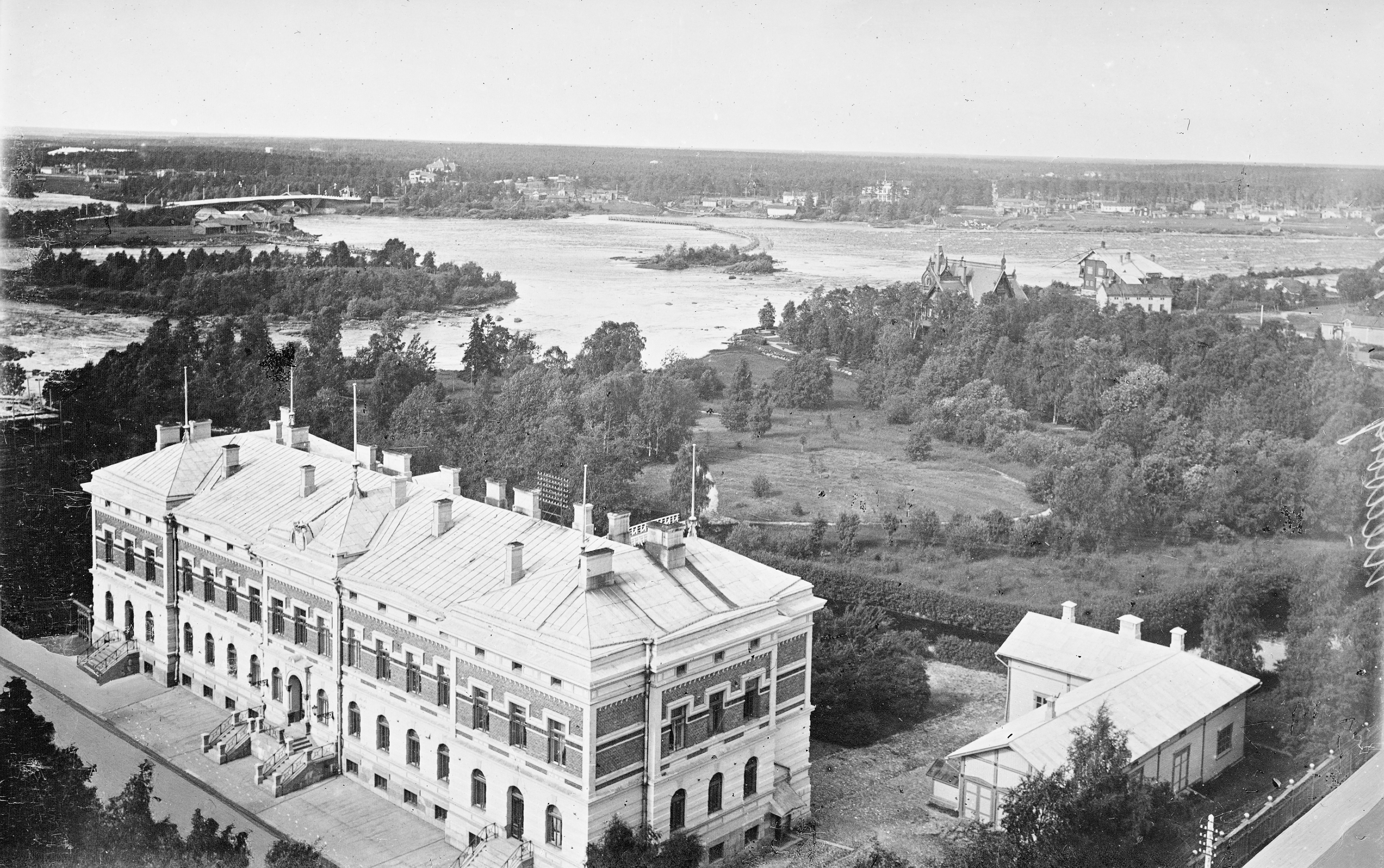 Entinen Oulun lääninhallituksen päärakennus kuvattuna vuonna 1908.